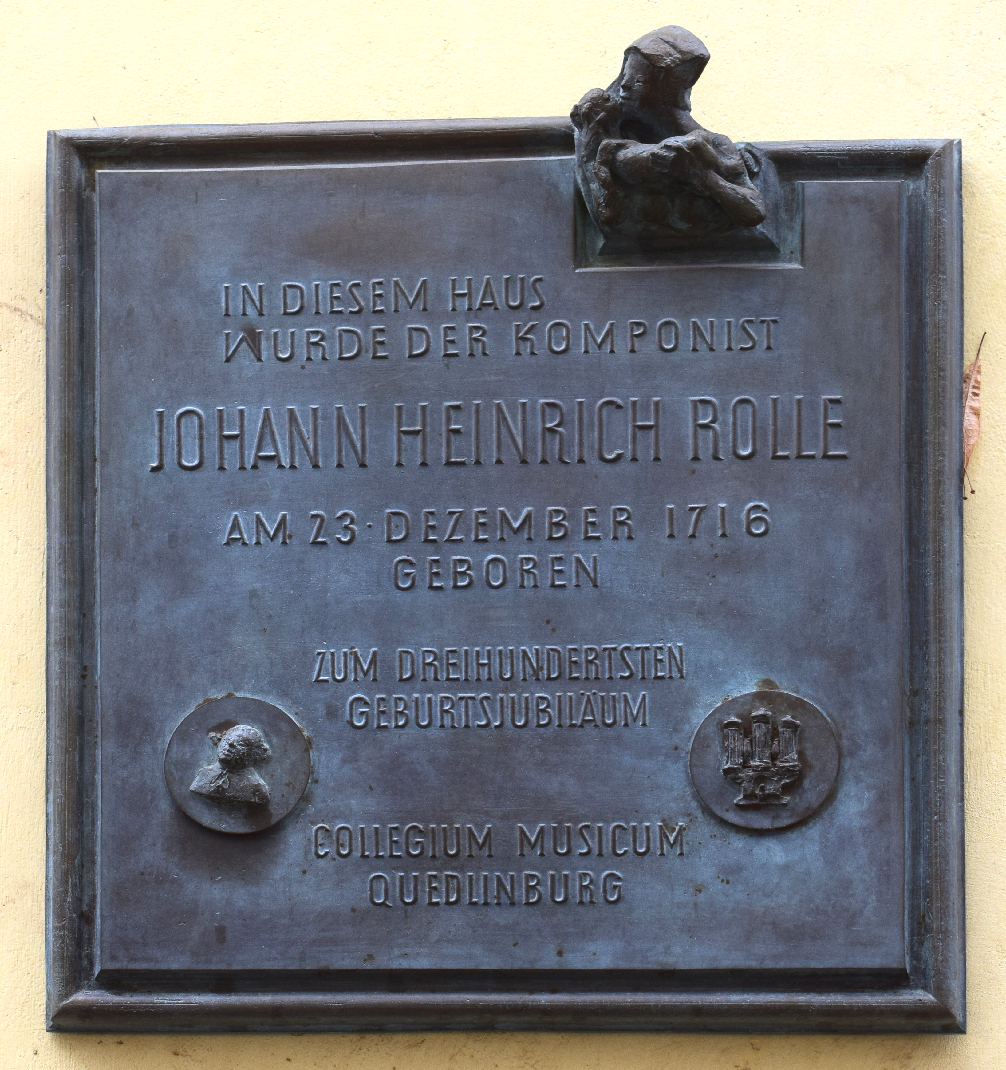 Gedenktafel am Geburtshaus des Komponisten Johann Heinrich Rolle in Quedlinburg.